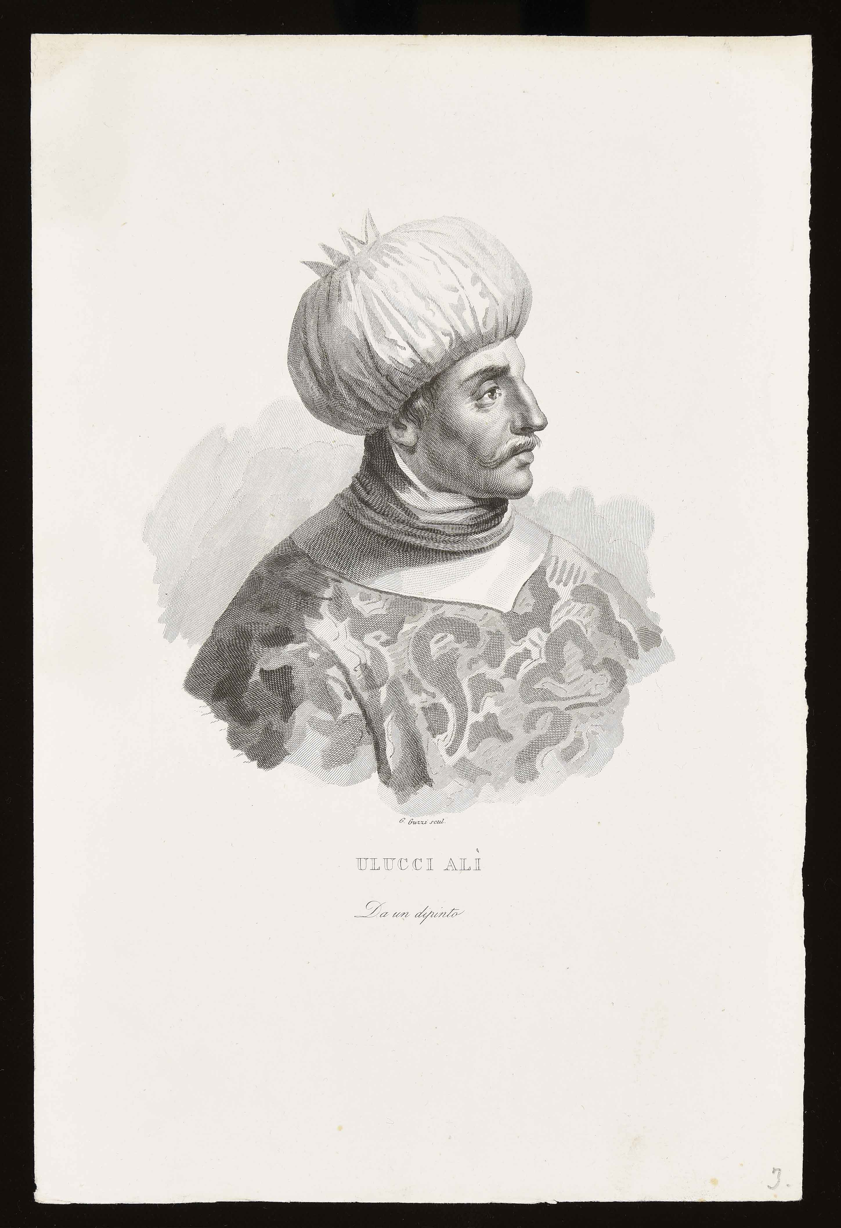 Calcografia in Iconografia italiana degli uomini e delle donne celebri: dall'epoca del risorgimento delle scienze e delle arti fino ai nostri giorni, Milano, Antonio Locatelli, 1837.